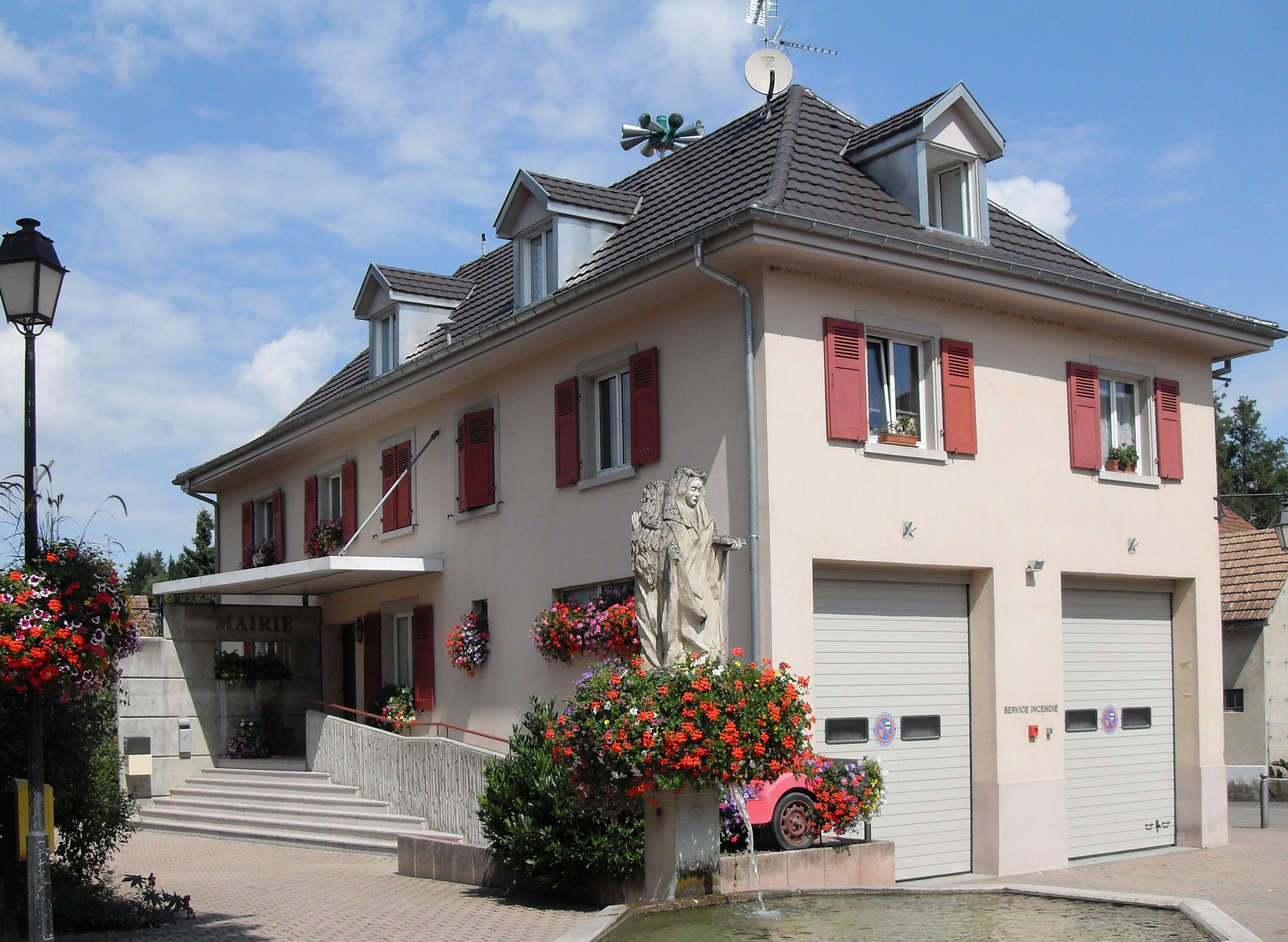 La mairie de Wentzwiller